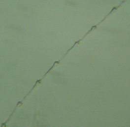 虎皮鹦鹉的纤羽 smartneddy 2002年摄